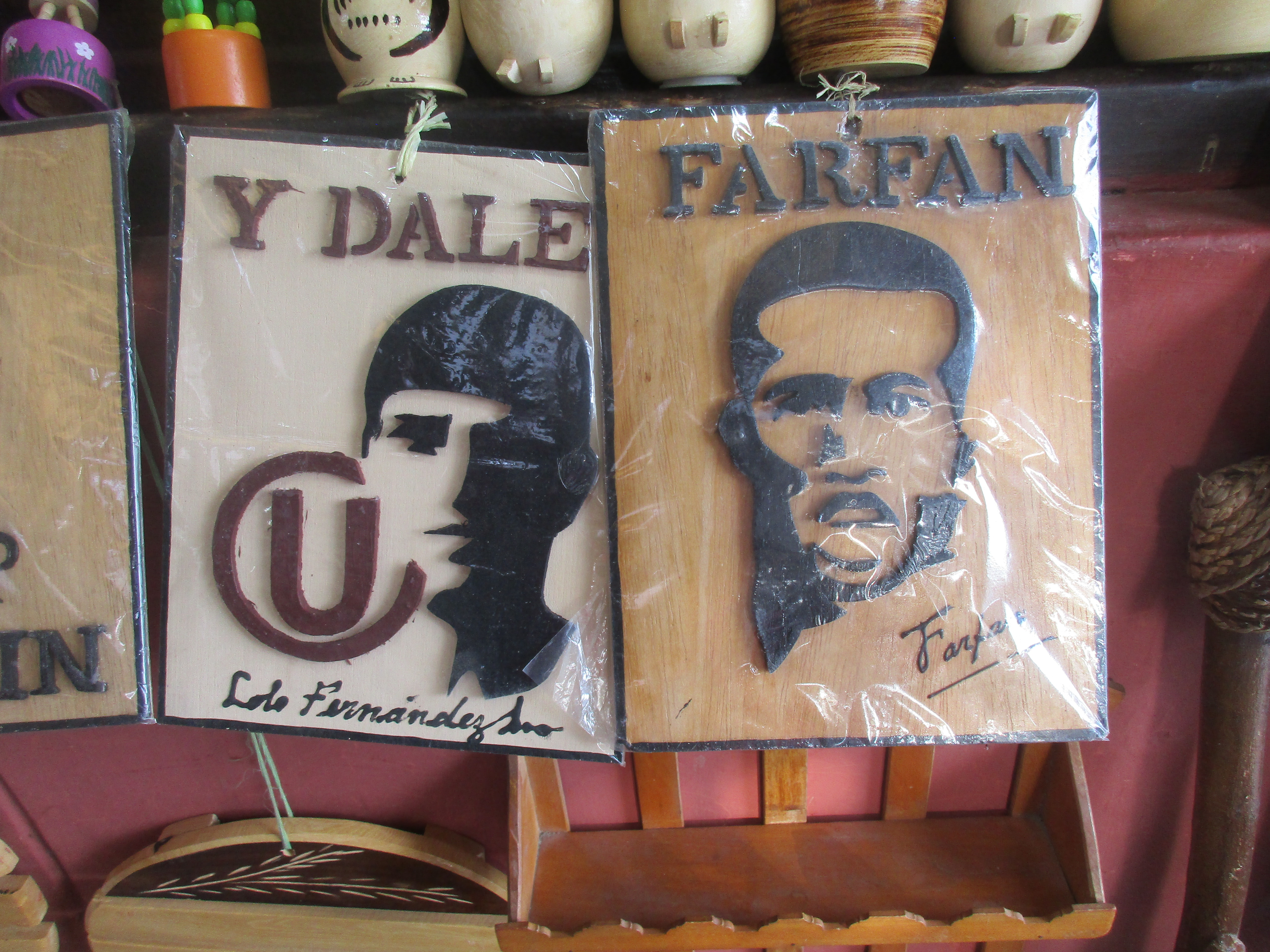 Retrato de Lolo Fernández y Jefferson Farfán, parte de la cultura popular del fútbol peruano en un mercadillo de Monsefú. Chiclayo.